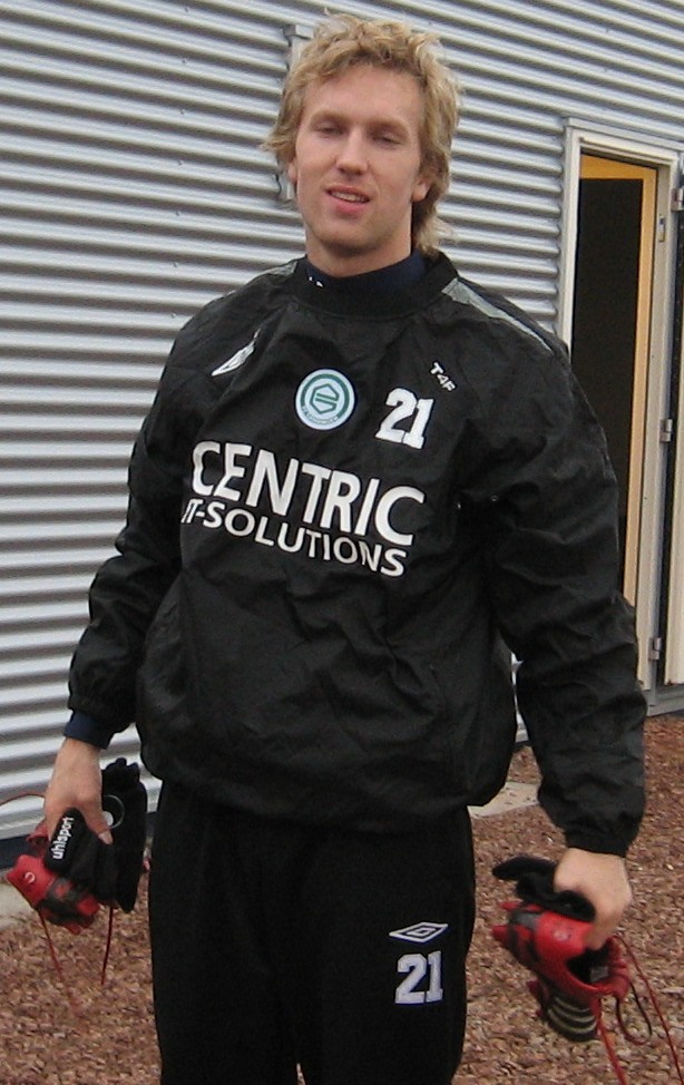 FC Groningen-speler (tegenwoordig bij Ajax) Rasmus Lindgren